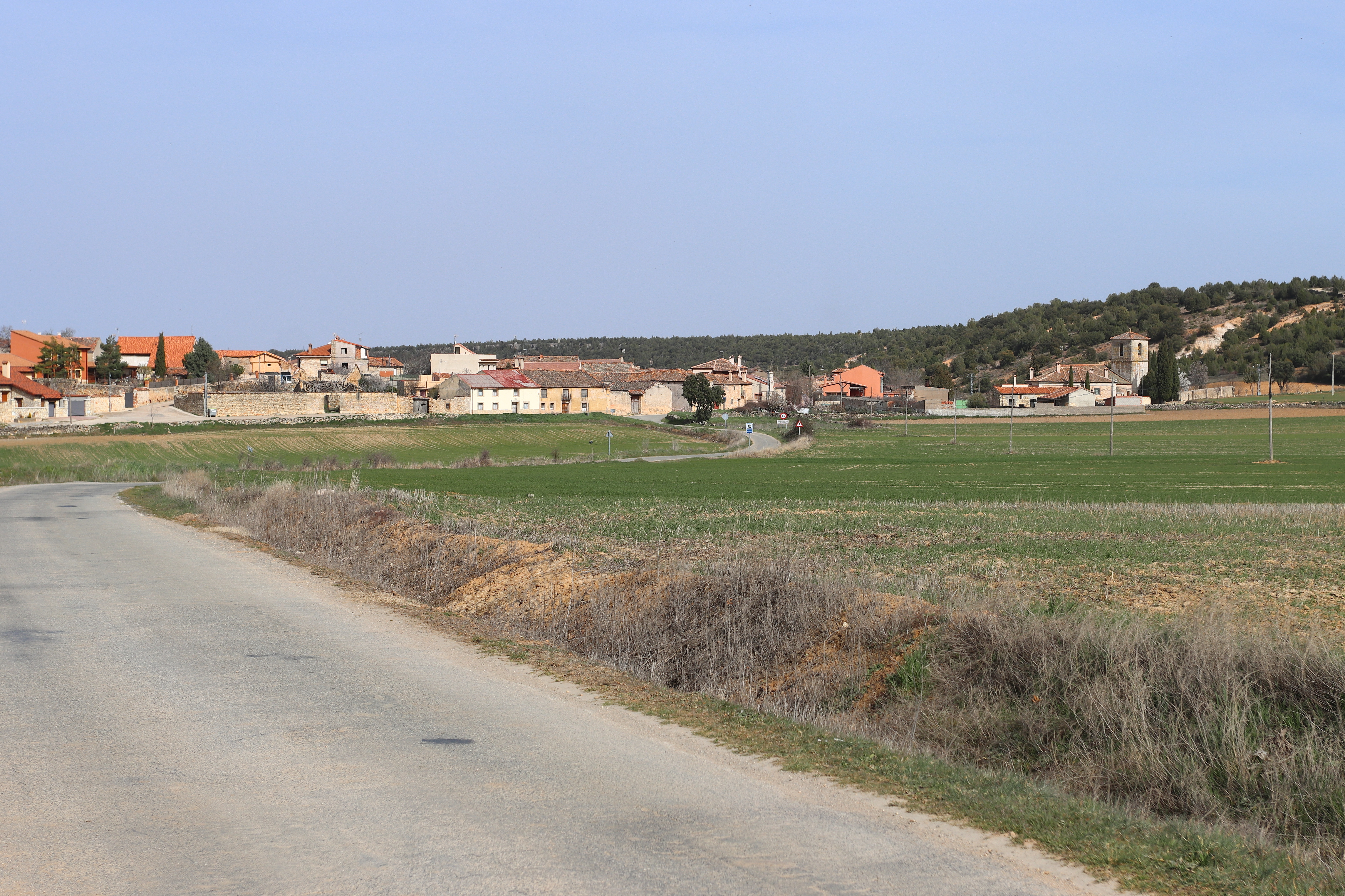 Arevalillo de Cega, vista de la población desde SG-V-2312